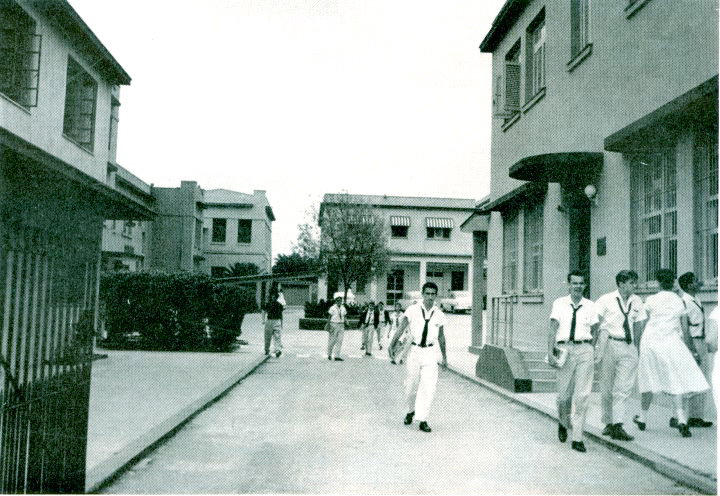 Alumnos saliendo del colegio